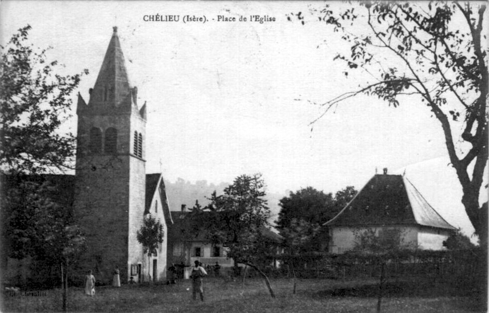 Place de l'église. Chélieu, Isère, France. Environs de Virieu. Carte postale ancienne.